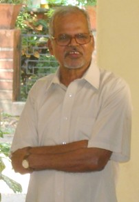 ആറ്റൂർ രവിവർമ്മ